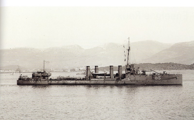 Destroyer français Bisson leader-ship de classe Bisson (1910)